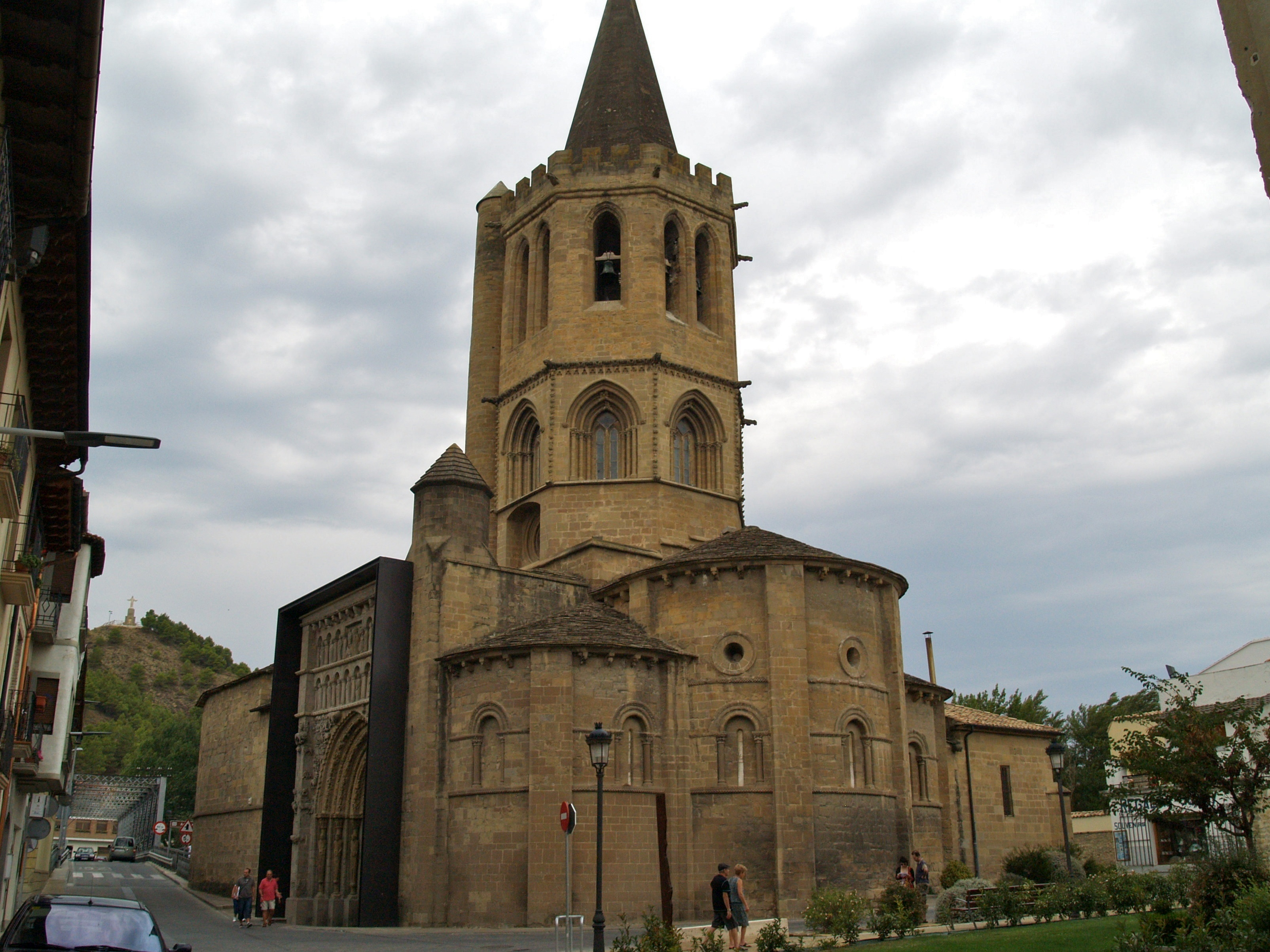 Sangüesa - Santa Maria la Real S.XII-XIII